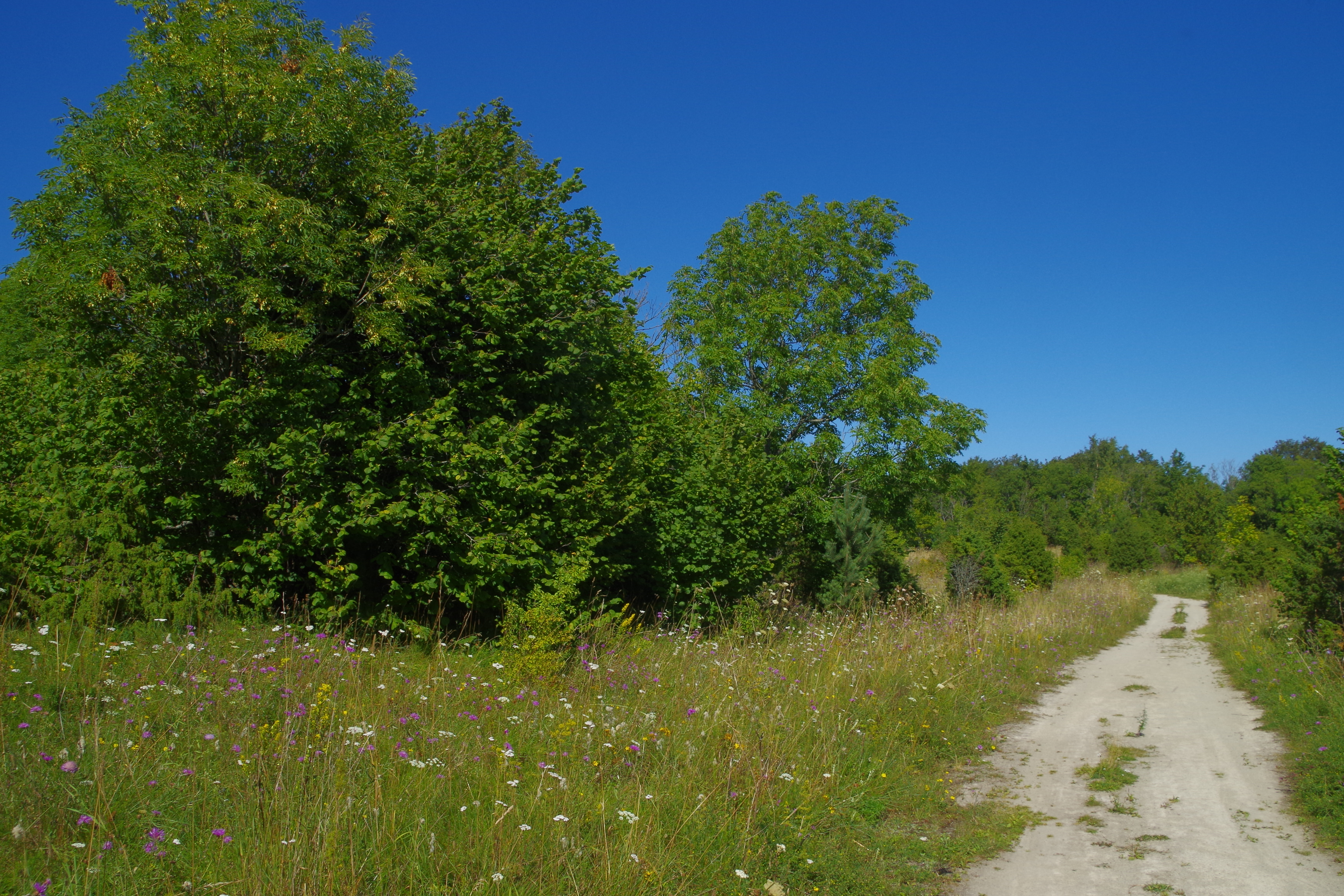 Muistsed põllud